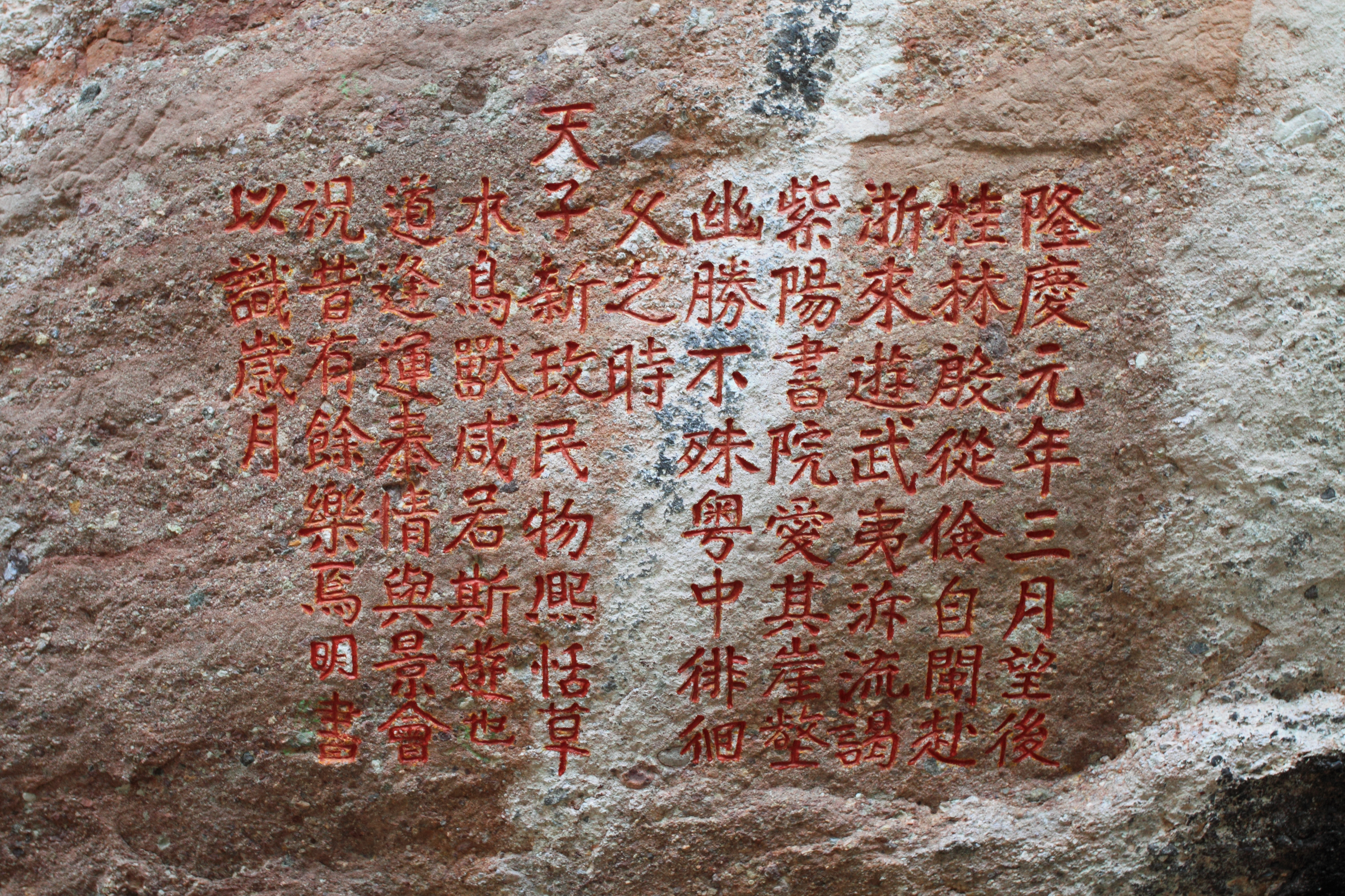 水光岩摩崖石刻